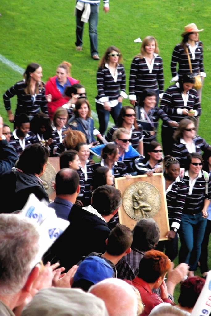 Tour d'honneur (trophée 2014) à la mi-temps du match MHR-RM 92.Tour d'honneur des féminines du MHR (trophée 2014) à la mi-temps du match Montpellier -RM 92.